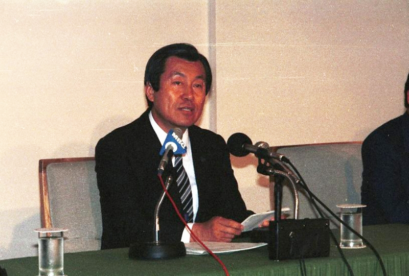 박세직올림픽조직위 위원장과 염보현서울시장, 김종하대한체육회장은 7일 프레스센터에서 합동기자회견을 갖고 86아시안게임의 결산과 88서울올림픽의 대비책을 밝혔다.